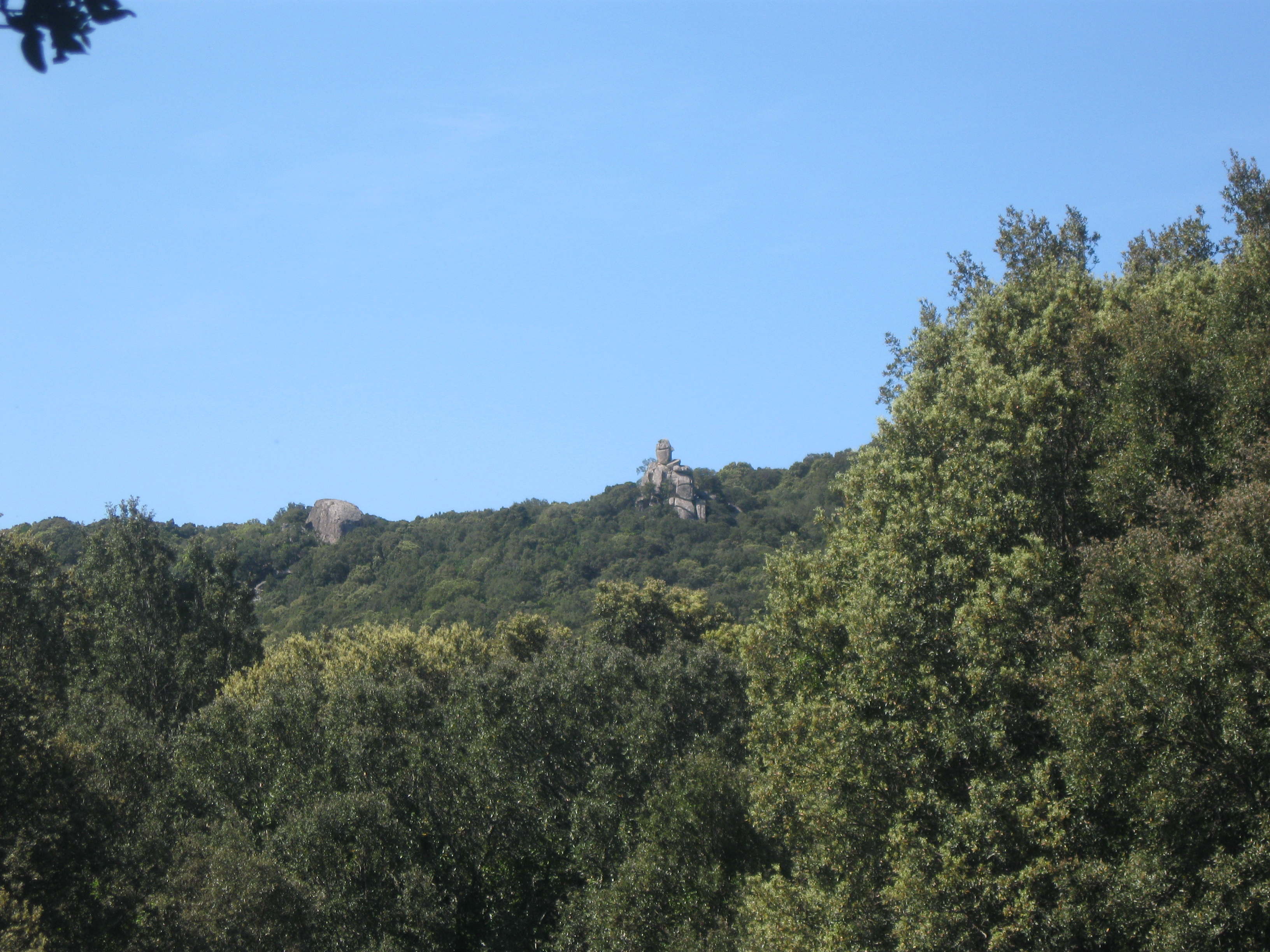 L'Omu di Talza Corsu: L'Omu di Talza